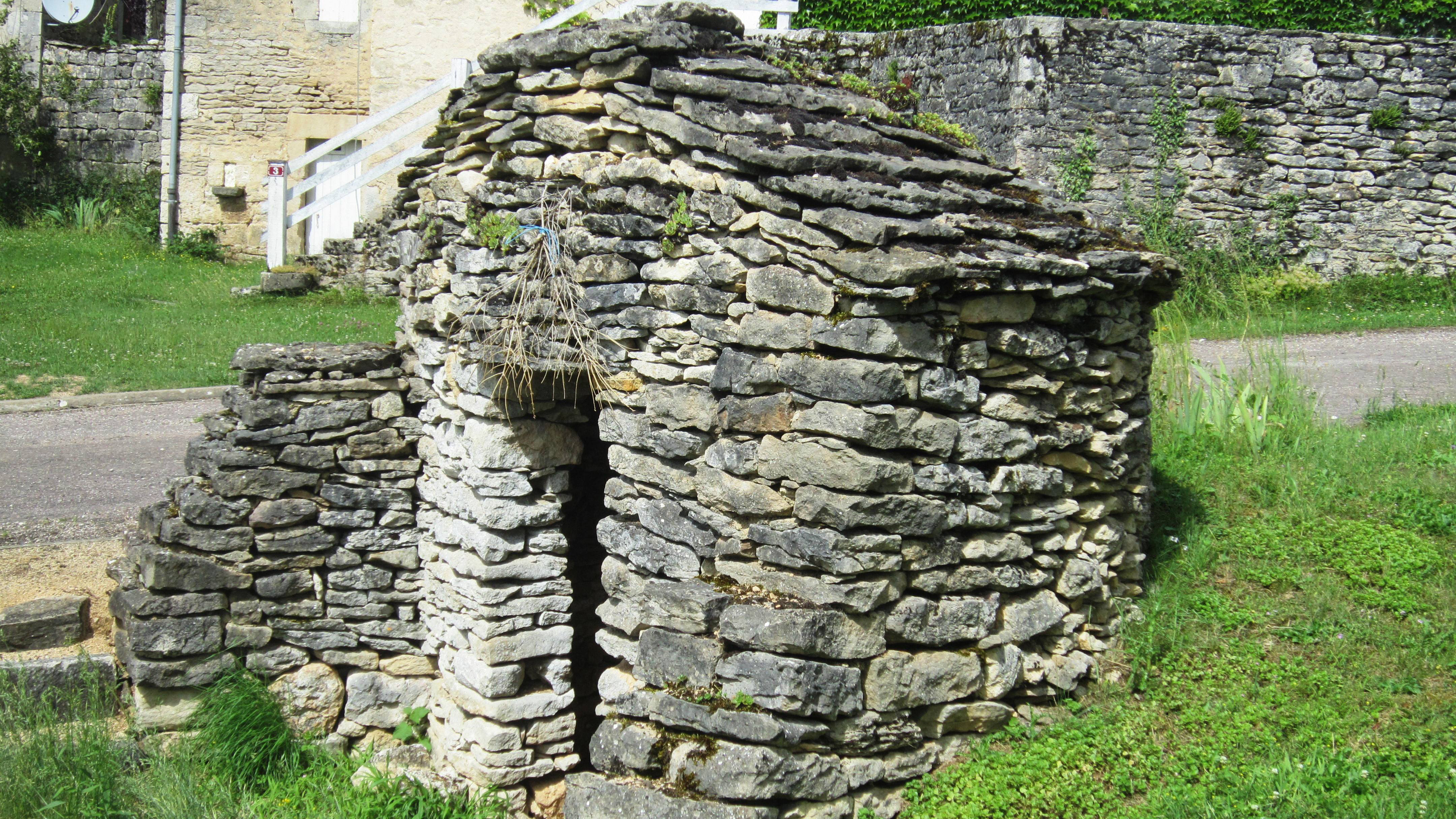 Abri de vigneron dans le Châtillonnais (France)